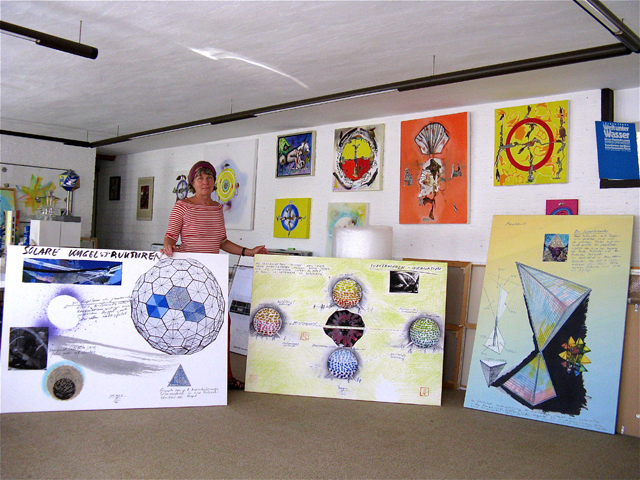 Atelier des deutschen Künstlers und Schriftstellers Jürgen Claus (* 1935 Berlin). Es zeigt seine Frau Nora Claus und einige seiner Werke.